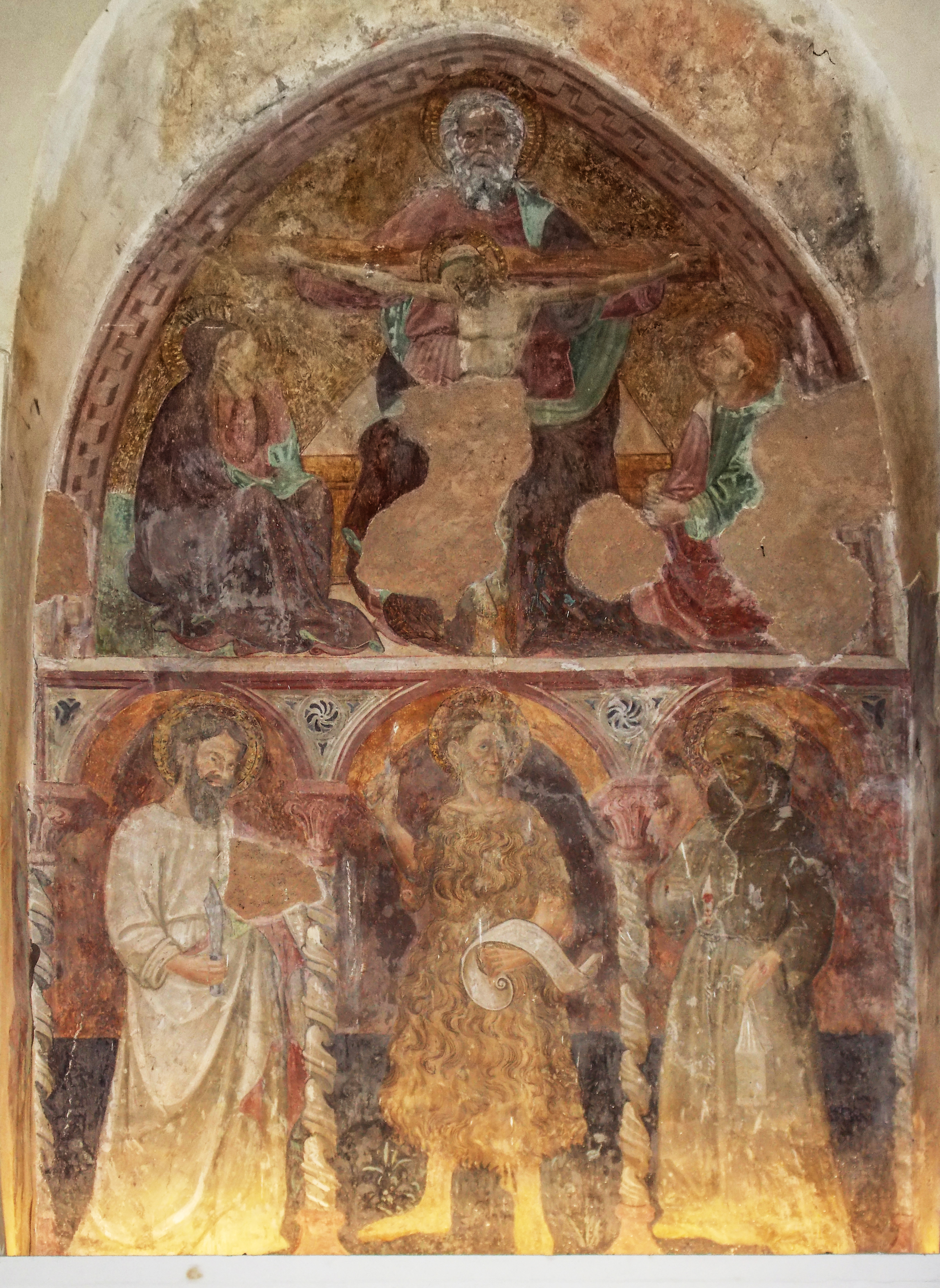 Convento di San Francesco di Benevento. Affresco del XV secolo